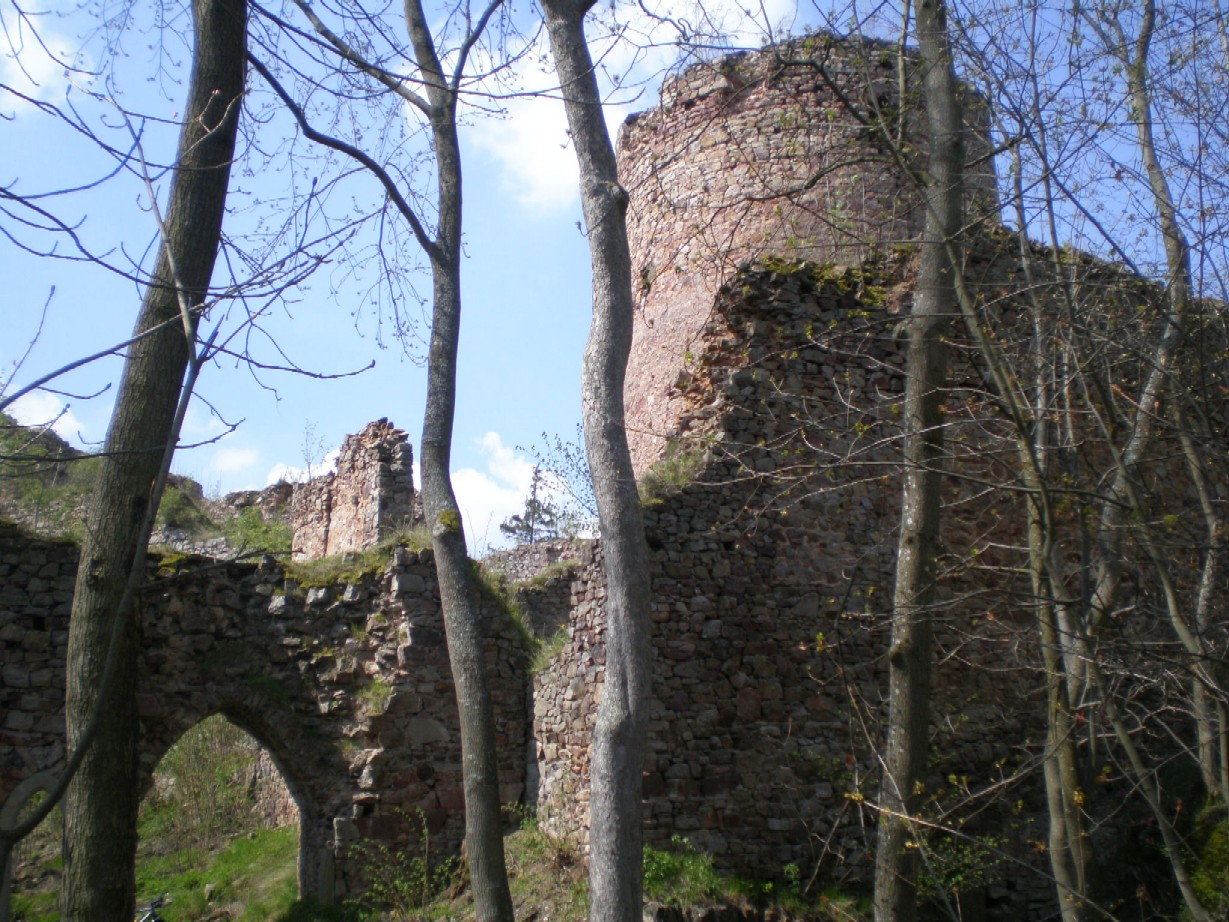 Zřícenina hradu Valdek v údolí Červeného potoka v Brdech.